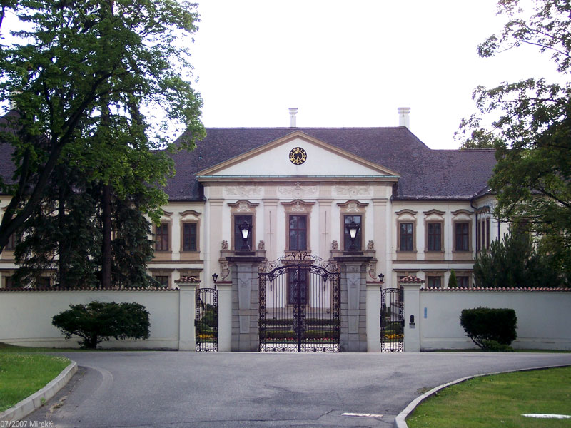 Praha-Koloděje, Státní zámek Koloděje / Prague-Koloděje, castle